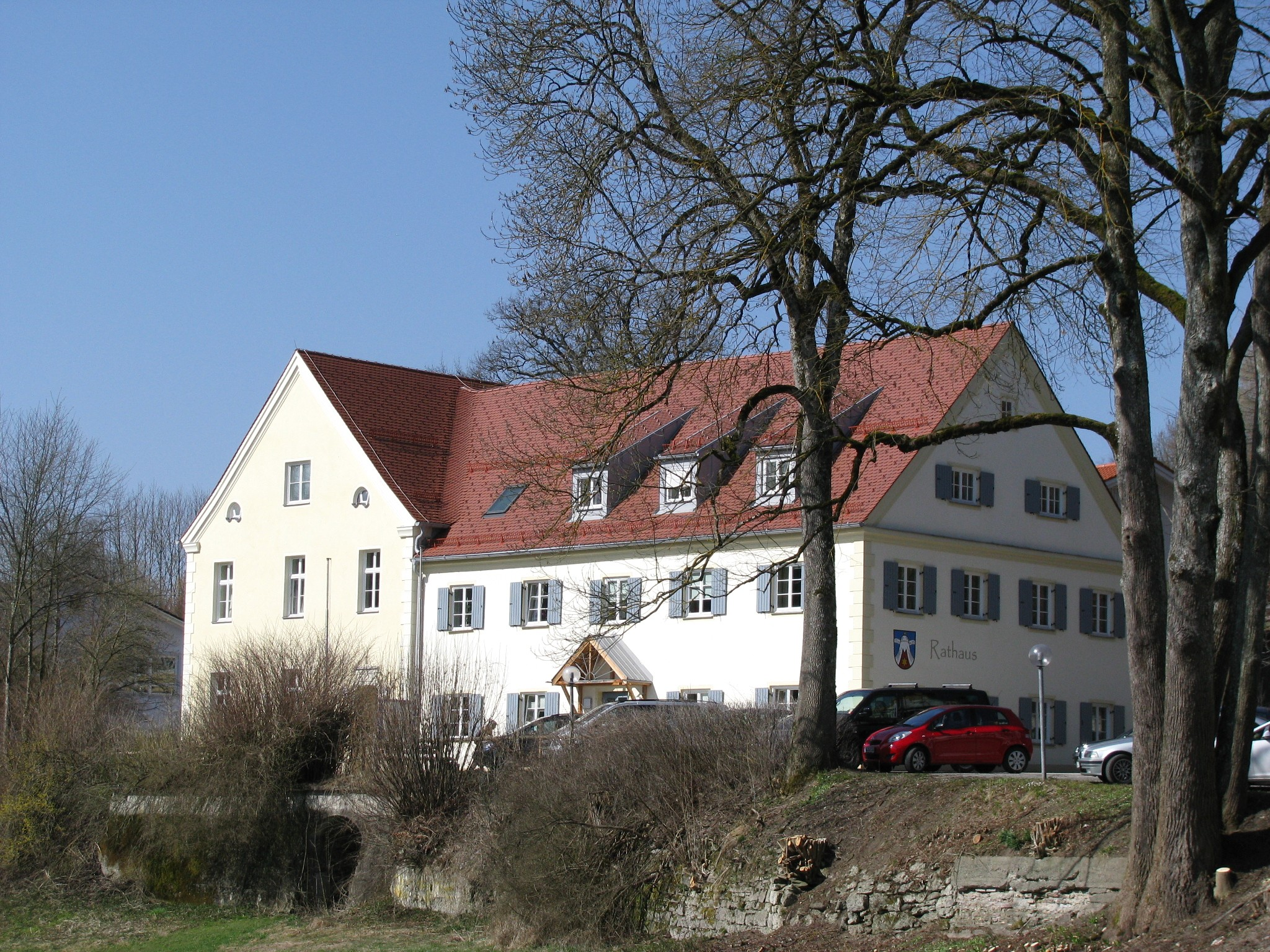 Rathaus Dietramszell